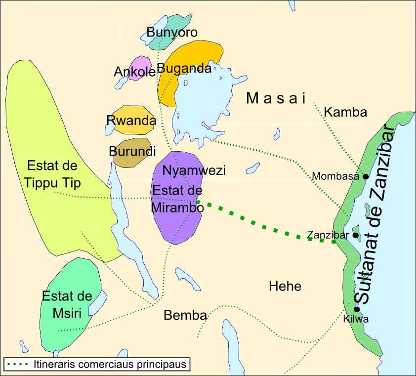 Region dau Sultanat de Zanzibar vèrs 1875.